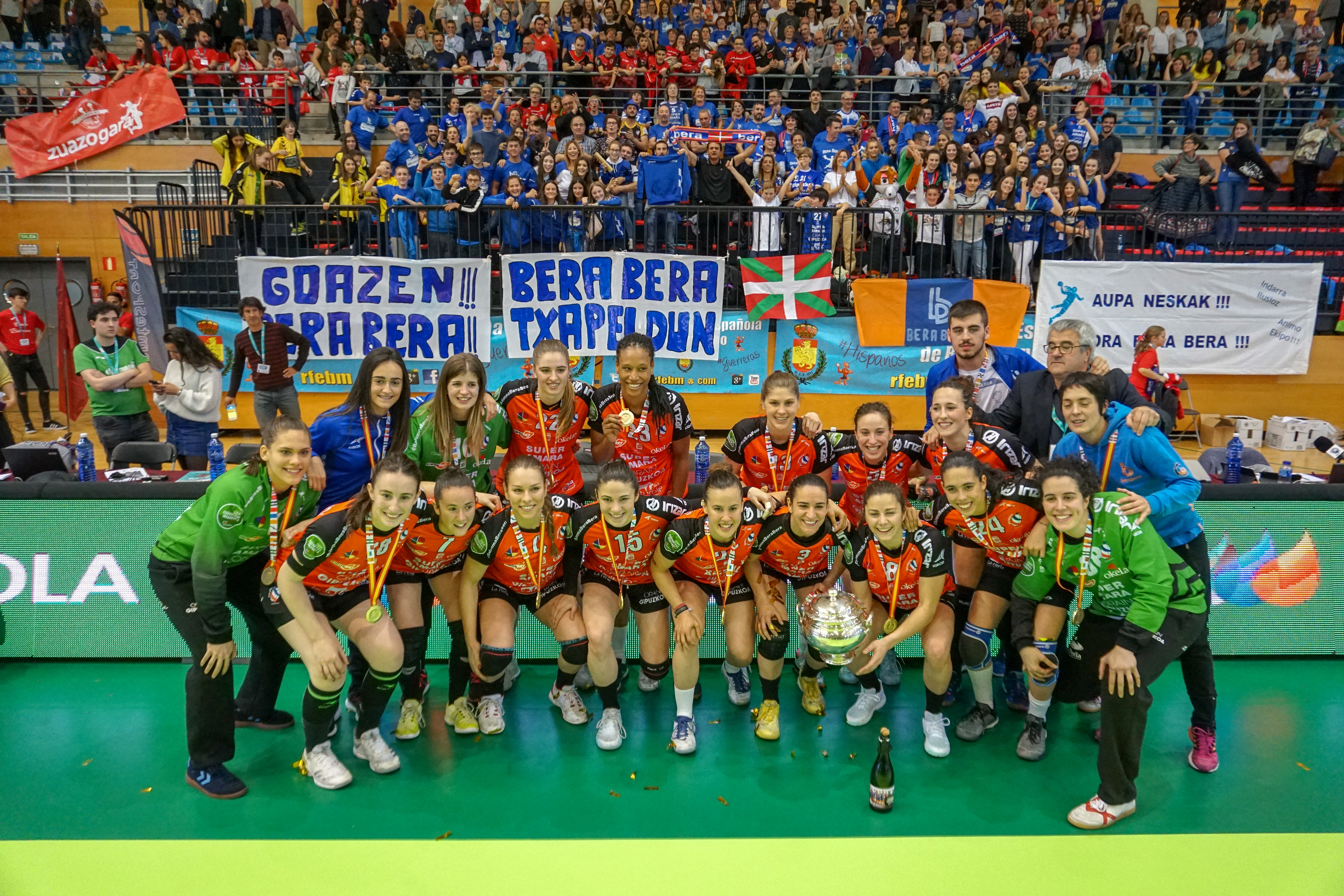 Balonmano Bera Bera ganador de la Copa de la Reina 2019